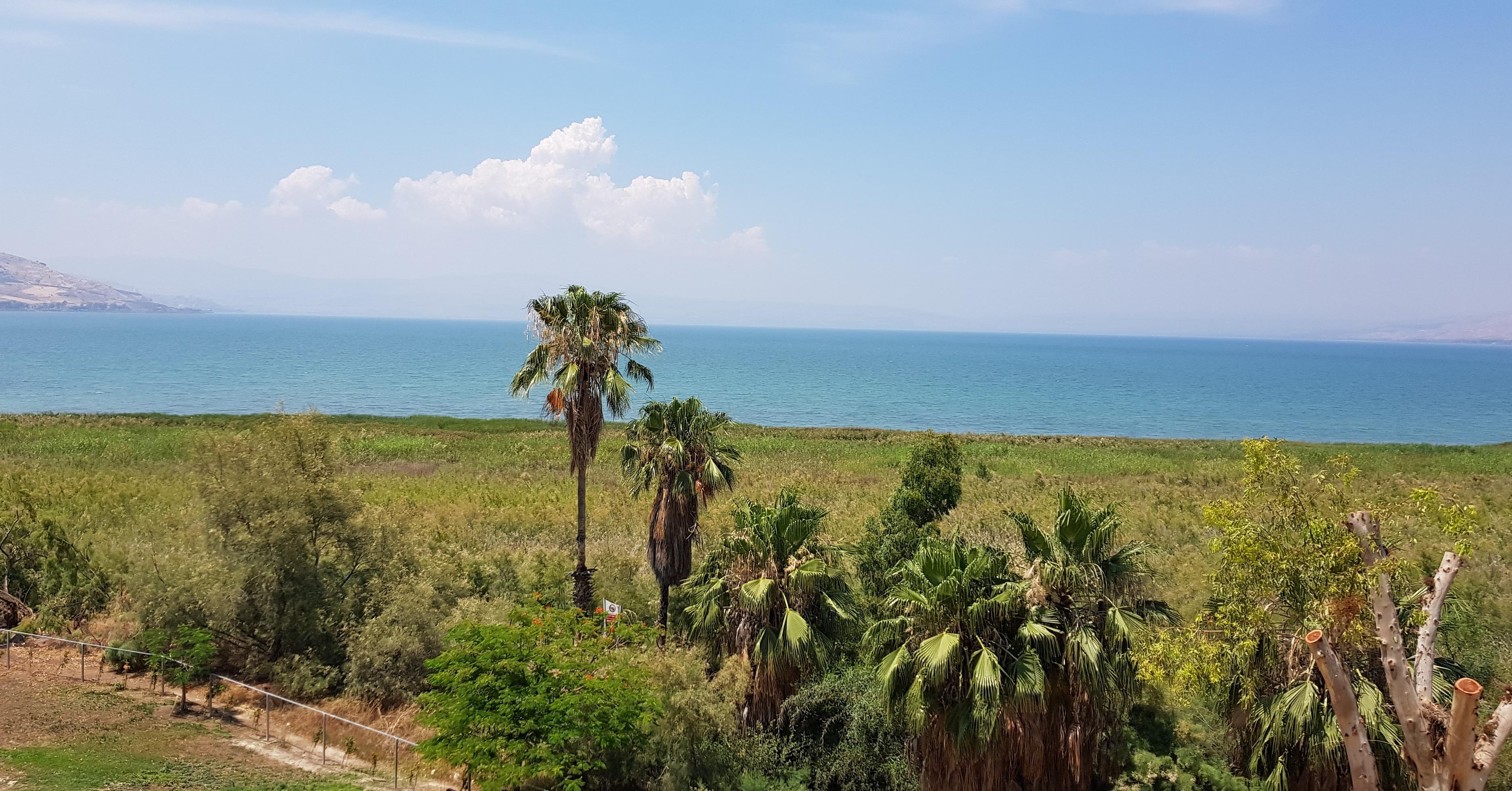 بحيرة طبريا